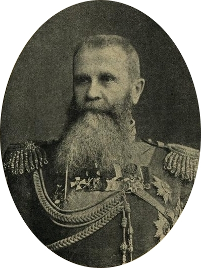 Николай Иудович Иванов, русский генерал.